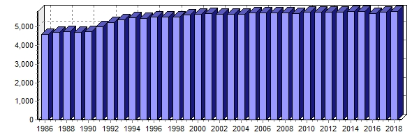 Statystyki dotyczące liczby członków Kościoła Adwentystów Dnia Siódmego w RP z lat 1986-2018.